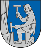 Das Schladminger Stadtwappen beruht auf einem alten Marktsiegel aus dem Jahre 1621, auf dem ein kniender Bergmann bei der Arbeit dargestellt wird.Es zeigt einen Bergmann im Halbprofil mit Spitzhacke und Schlägel. Die Darstellung ist in Silber und Ocker vor blauem Hintergrund.